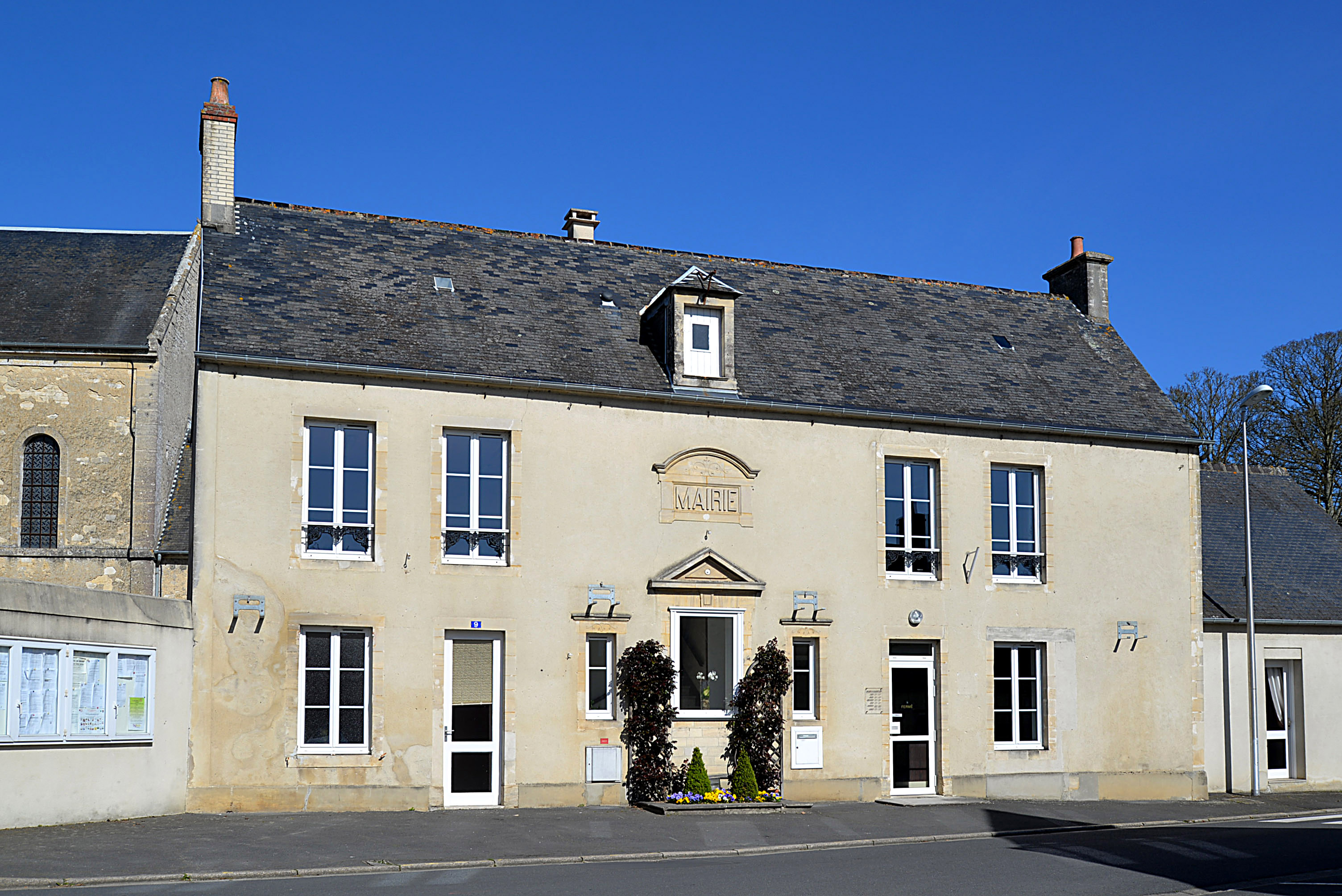 Saint-Vigor-le-Grand (14)